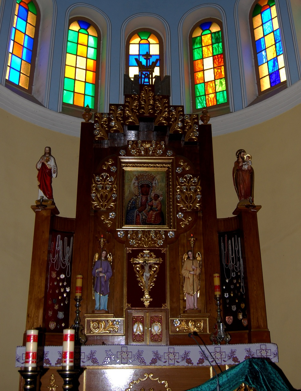 Ołtarz kościelny z kopią obrazu M.B. Częstochowskiej w Grabownie Wielkim